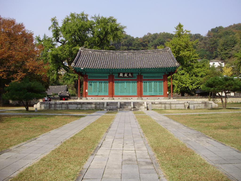 Daeseongjeon Hall of Jeonju Hyanggyo